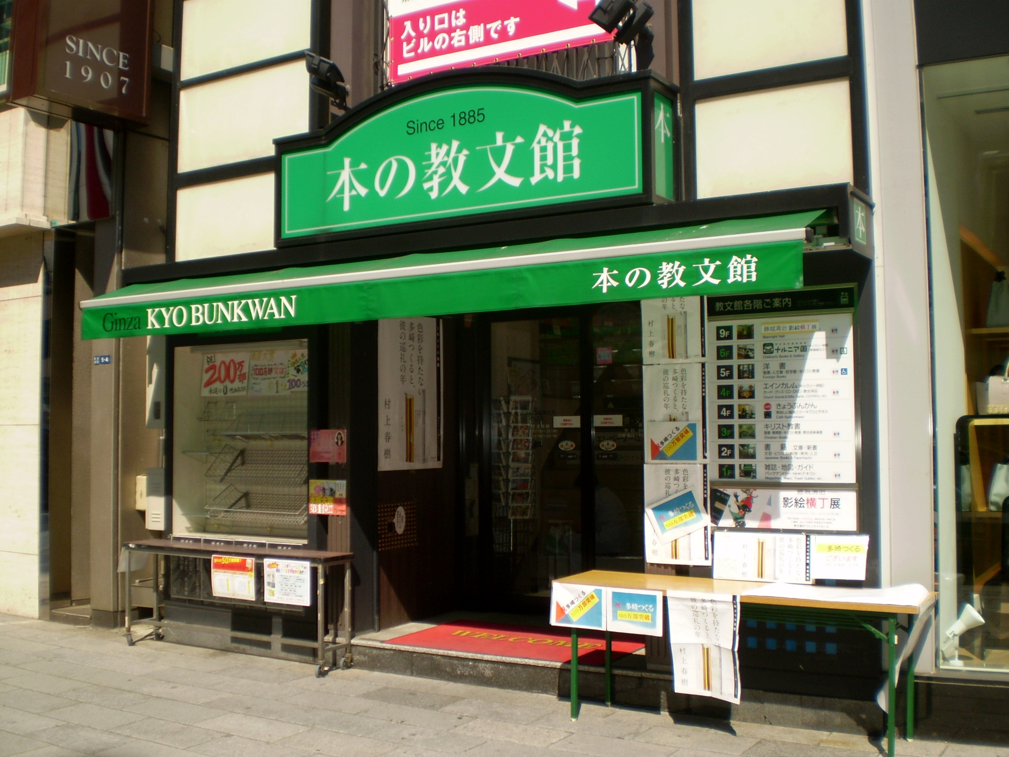 教文館1階入口